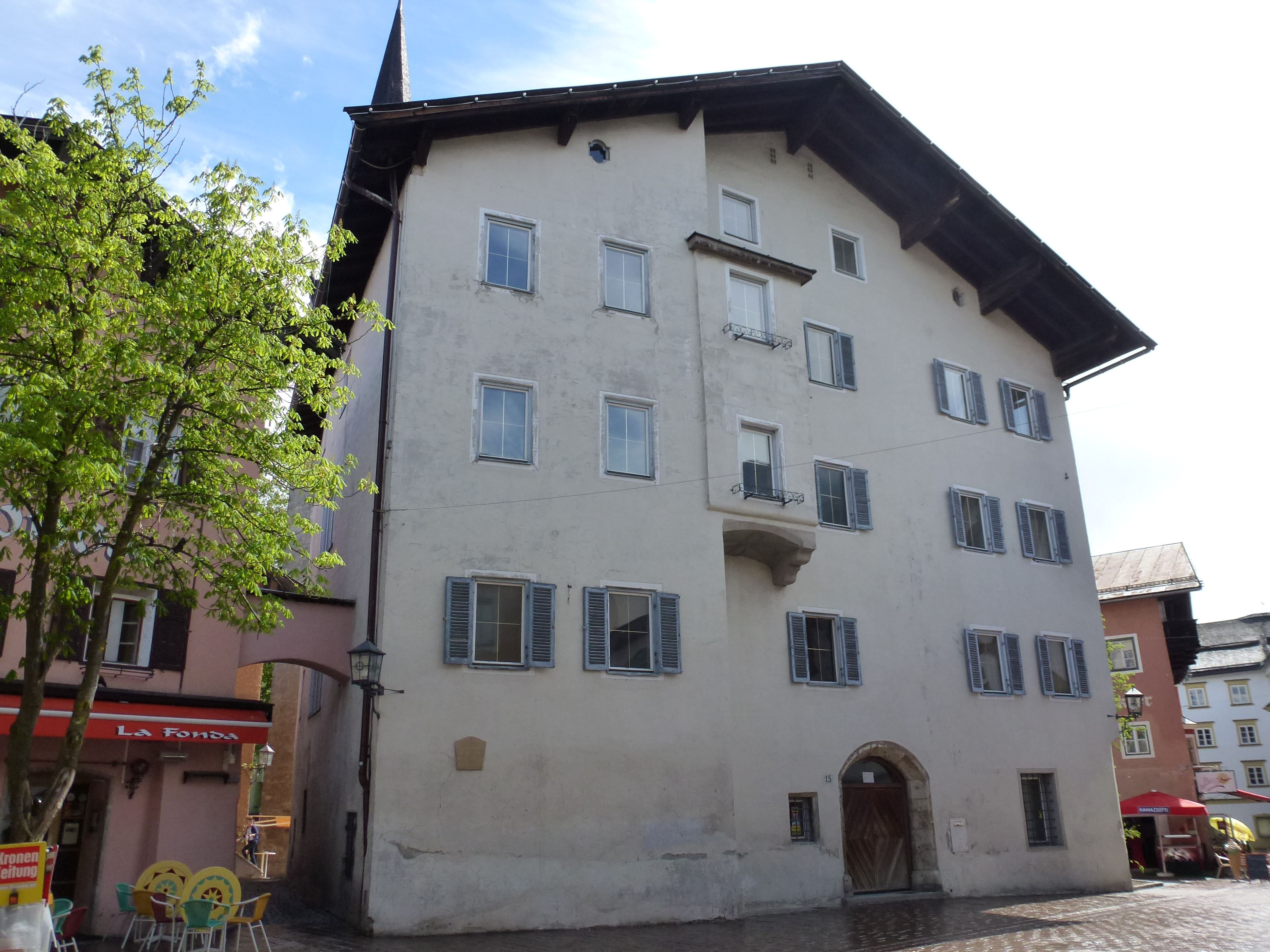 Ehem. Amtsgebäude (Finanzamt, Berggericht) - Hinterstadt 15, Kitzbühel